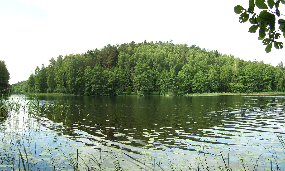 Kulionių piliakalnis